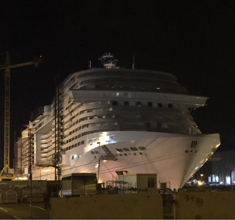 MSC Meraviglia en construction à Saint-Nazaire de nuit.